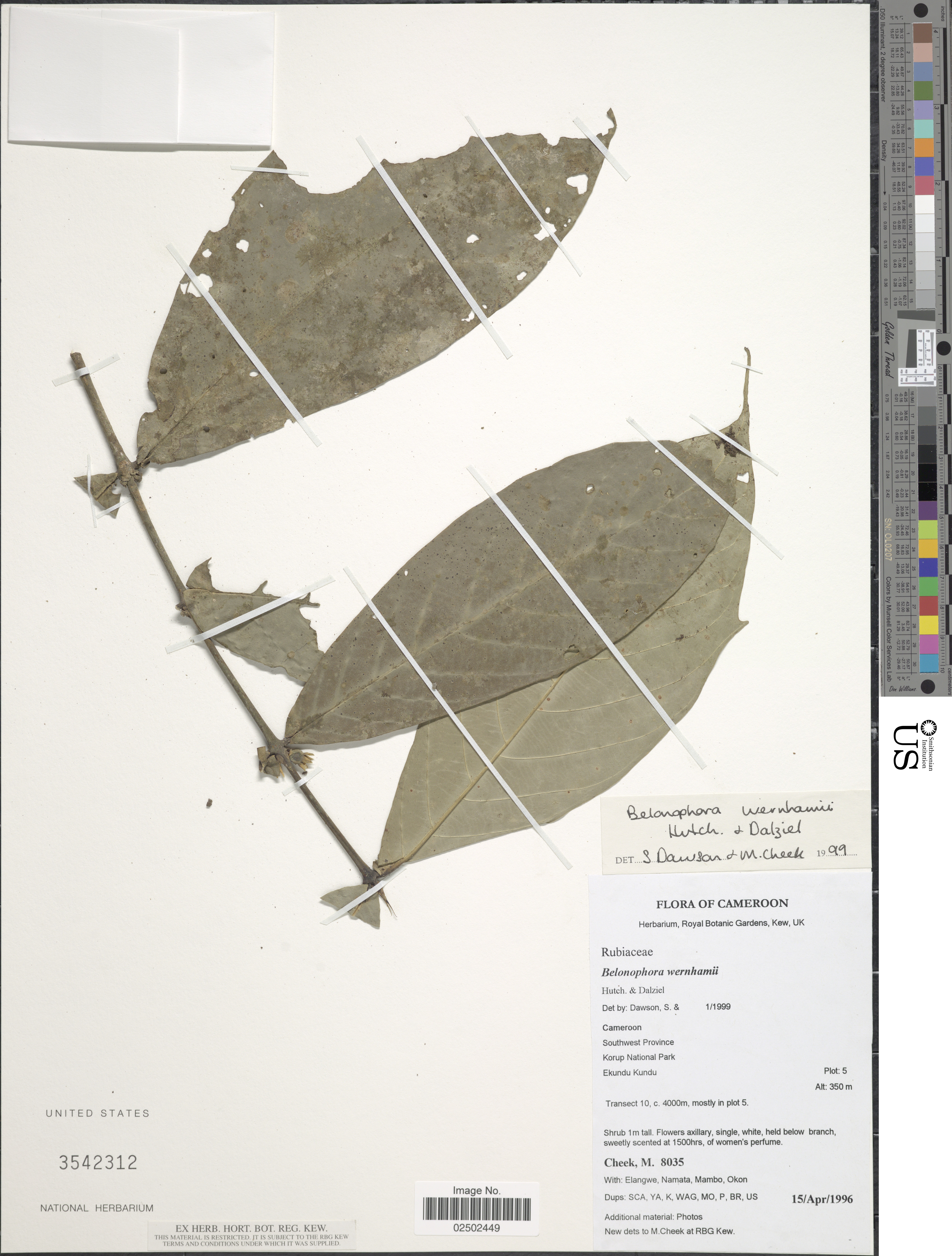 Belonophora wernhamii Hutch. & Dalziel Object Details Biogeographical Region 23 - West-Central Tropical Africa Collector M. Cheek Elangwe Namata Mambo -- Okon Min. Elevation 107 Record Last Modified 19 Dec 2017 Specimen Count 1 Collection Date 15 Apr 1996 Barcode 02502449 USNM Number 3542312 Place Southwest Province. Korup National Park. Ekundu Kundu, Transect 10, mostly in plot 5, Sud-Ouest, Cameroon, Africa Published Name Belonophora wernhamii Hutch. & Dalziel Taxonomy Plantae Dicotyledonae Rubiales Rubiaceae NMNH - Botany Dept. Record ID nmnhbotany_13696231 Usage of Metadata (Object Detail Text) CC0 GUID (Link to Original Record)